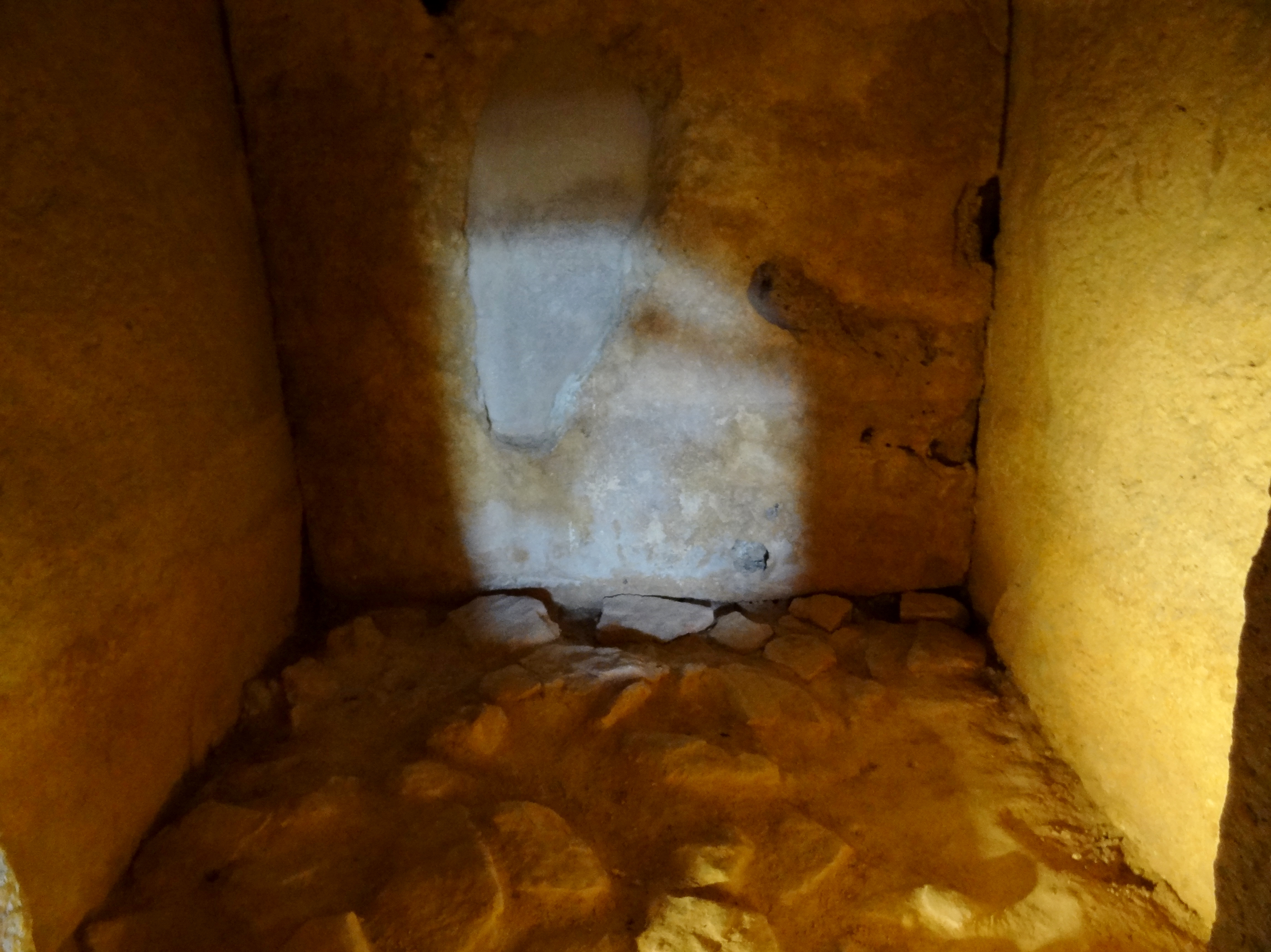 Dolmen de Viera in Antequera, Provinz Málaga, Spanien